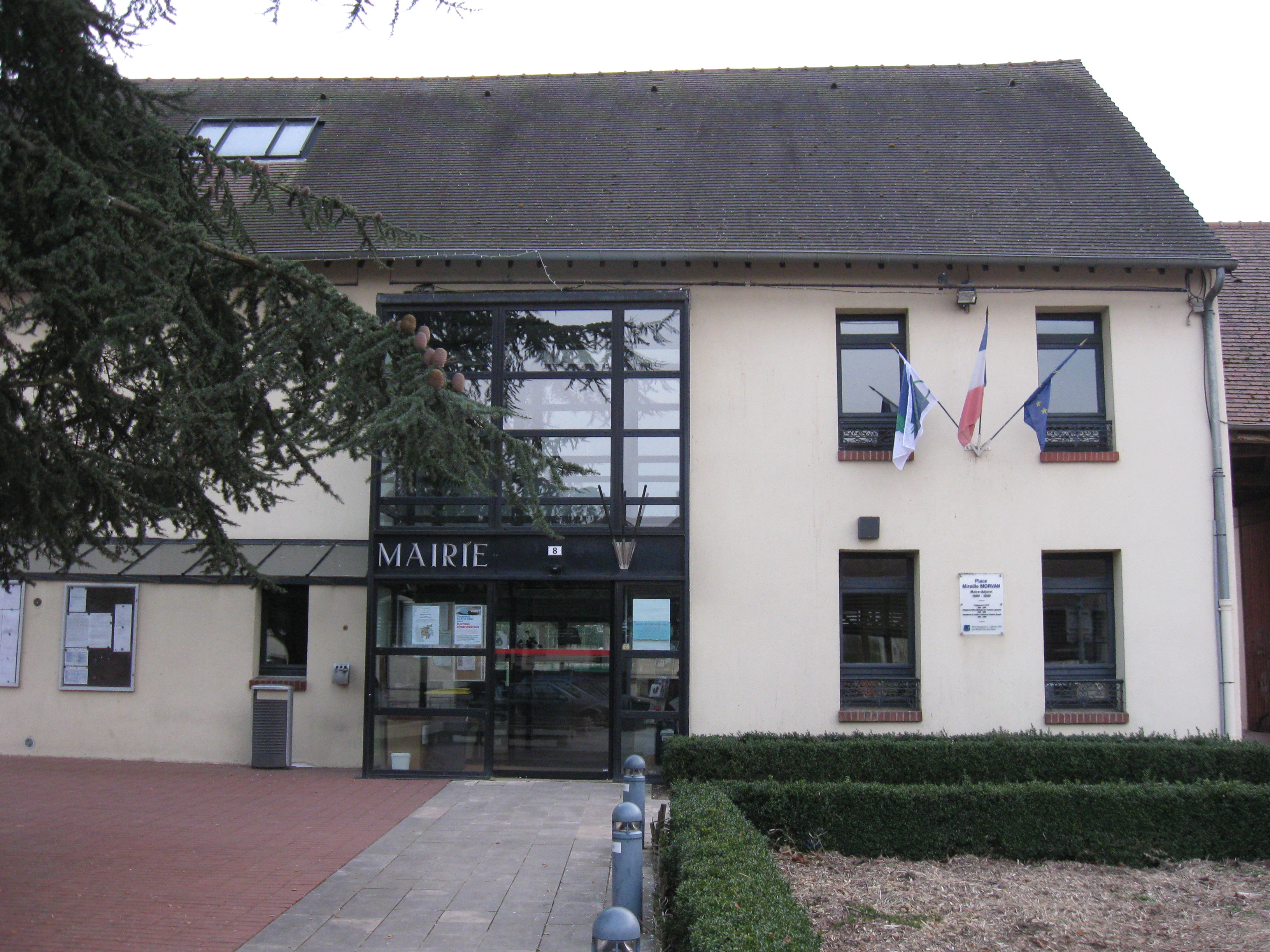 Mairie de Collégien. (Seine-et-Marne, région Île-de-France).